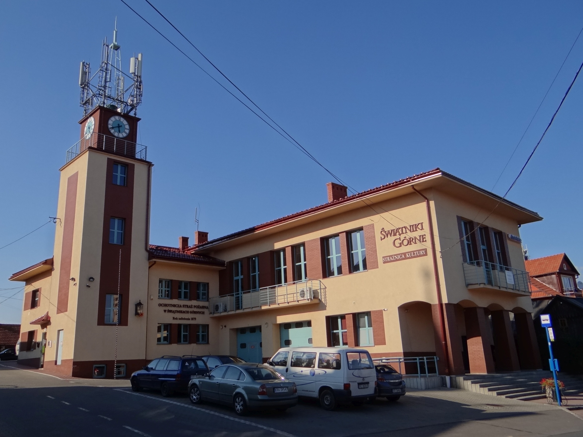 Remiza OSP w Świątnikach Górnych